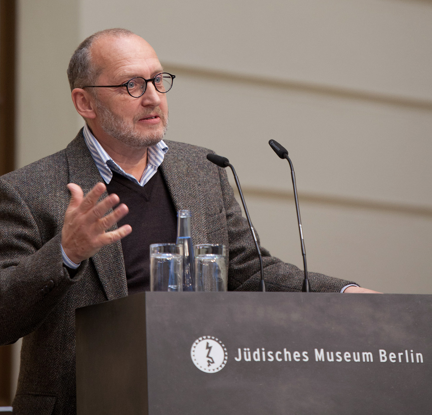 Impressionen der Konferenz "Zugang gestalten!" am 22. & 23. Oktober 2012 im Jüdischen Museum Berlin Andreas Lehne vom Österreichischen Bundesdenkmalamt